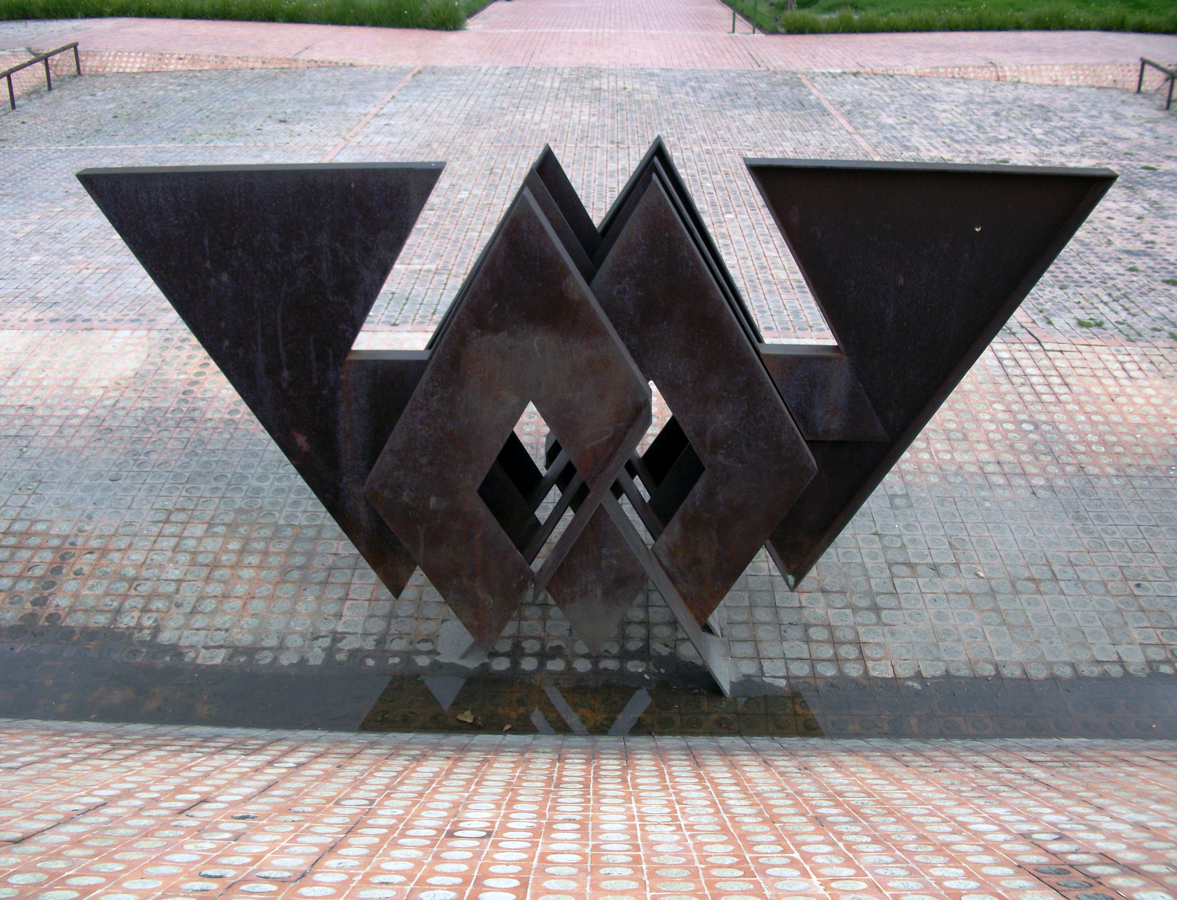 Escultura de Eduardo Ramírez Villamizar instalada el 20 de diciembre de 2001 en parque Virgilio Barco de Bogotá.